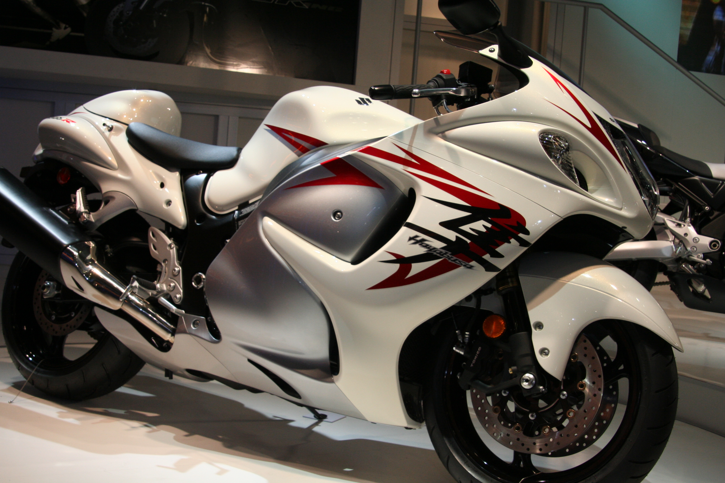 2008 Suzuki Hayabusa, as shown on 2007 Tokyo motor showHayabusa